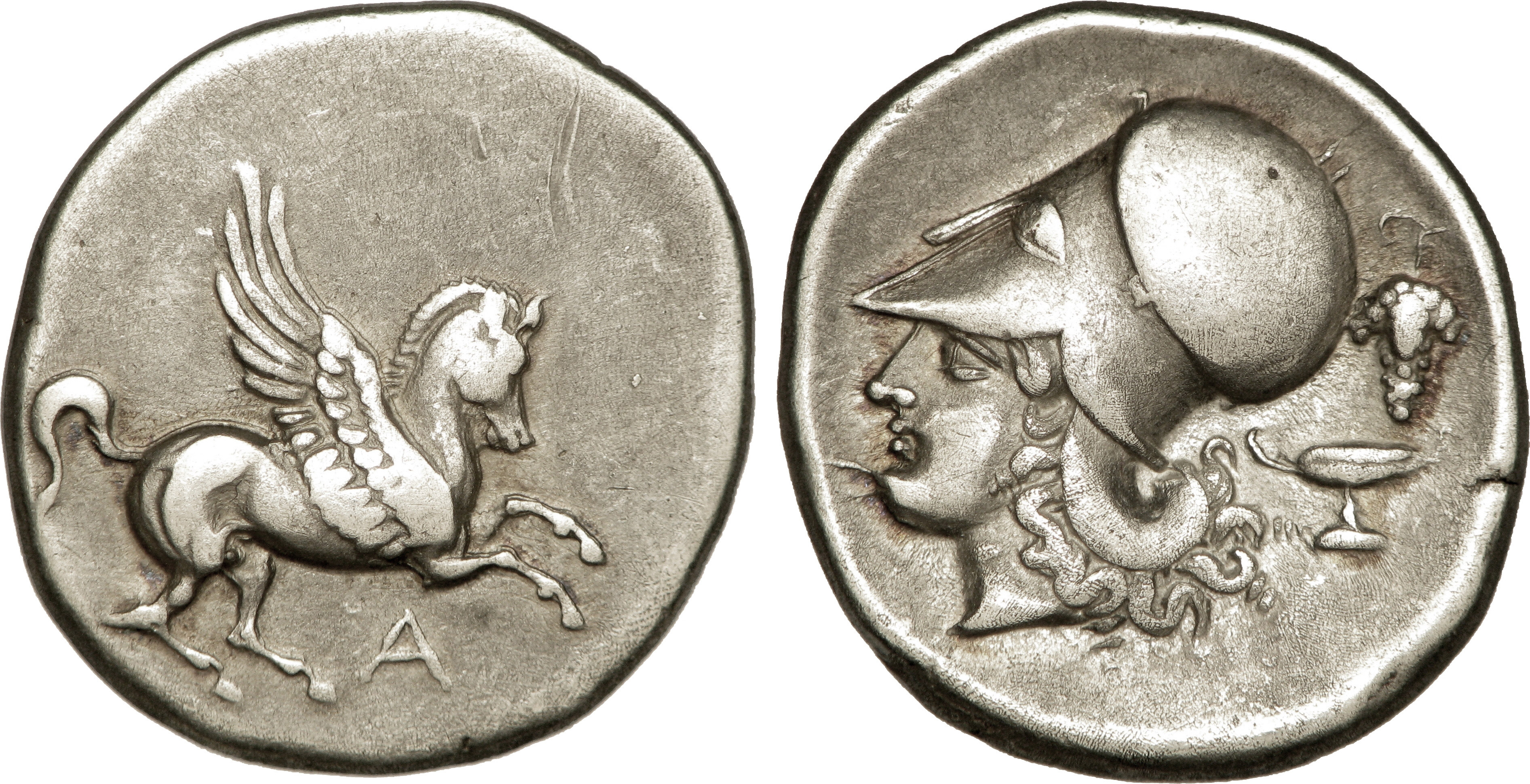 Nom de l'atelier : Épire, Ambracie Métal : argent Diamètre : 22,5mm Axe des coins : 12h. Poids : 8,31g. Titulature avers : A. Description avers : Pégase volant à droite. Titulature revers : Anépigraphe. Description revers : Tête d'Athéna à gauche, coiffée du casque corinthien ; derrière, une grappe de raisin au-dessus d’une coupe.